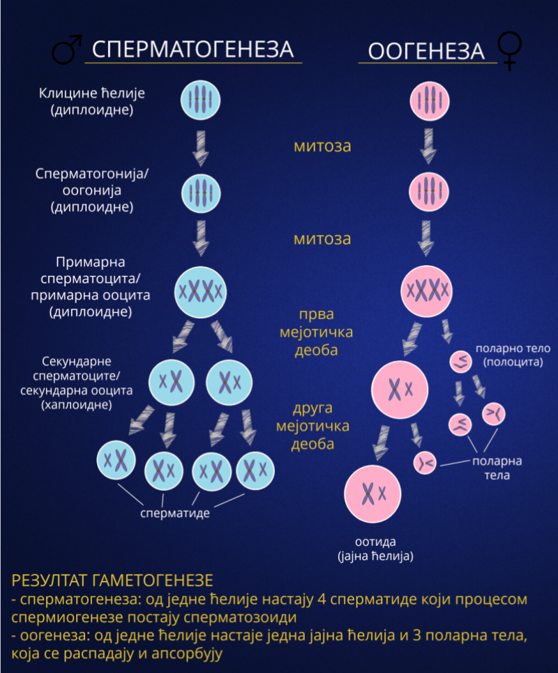 Српски (ћирилица): Детаљна шема гаметогенезе (сперматогенезе и оогенезе).